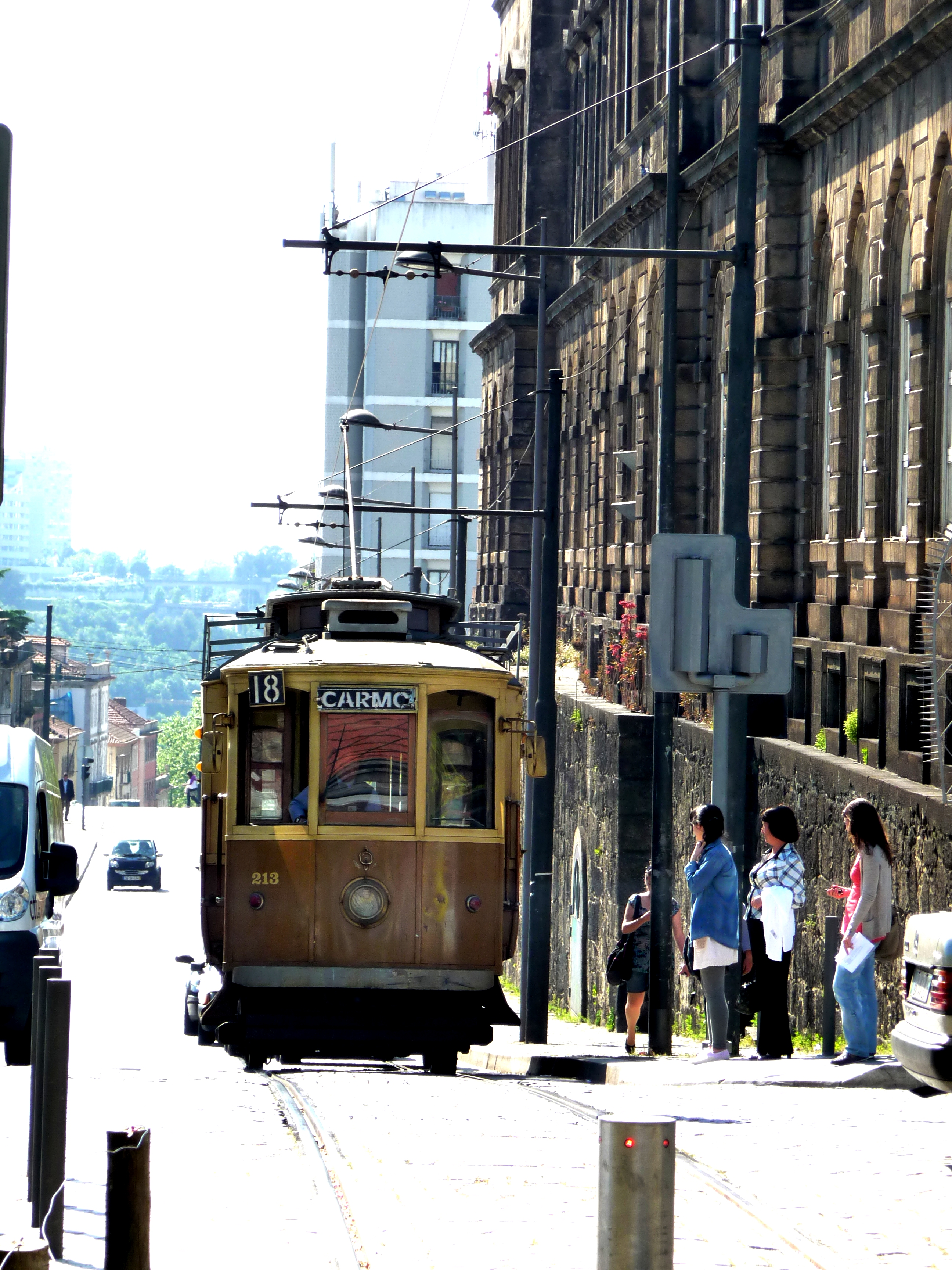 Rua da Restauração, junto ao Hospital de Santo António, Porto. This file was uploaded for Wiki Loves Monuments in Portugal with the unique identifier 73299.